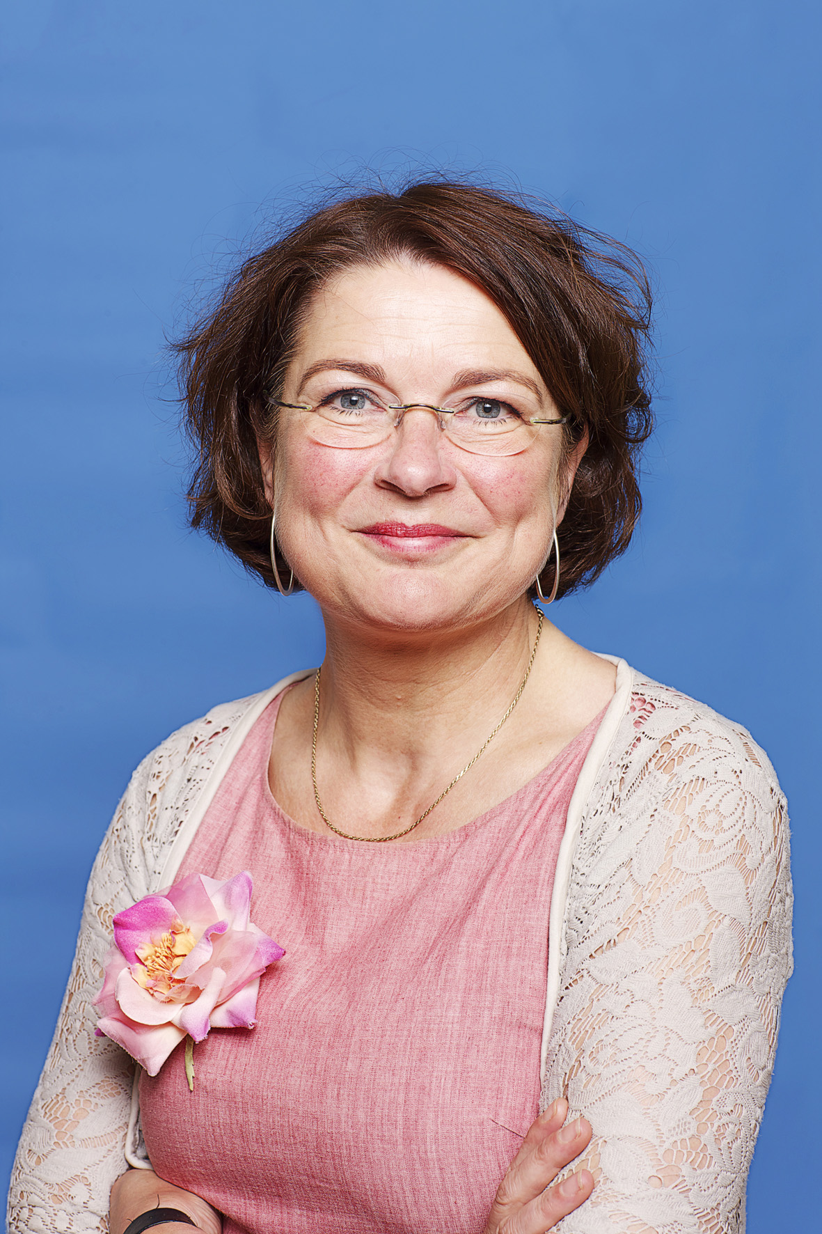 Agnes Wolbert, Tweede Kamerlid. Foto: Lex Draijer.